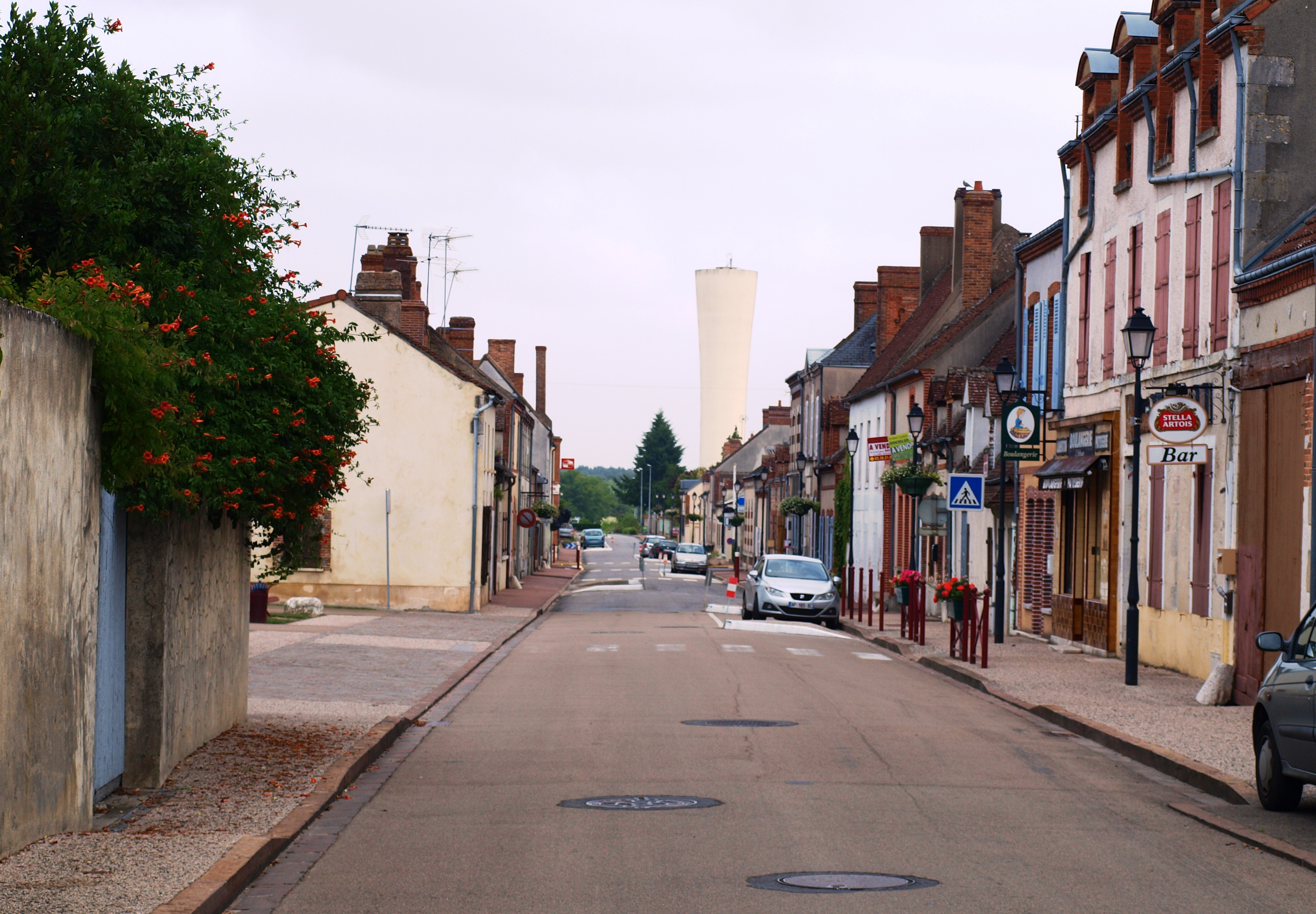 La Bussière (Loiret ; France) , rue principale.